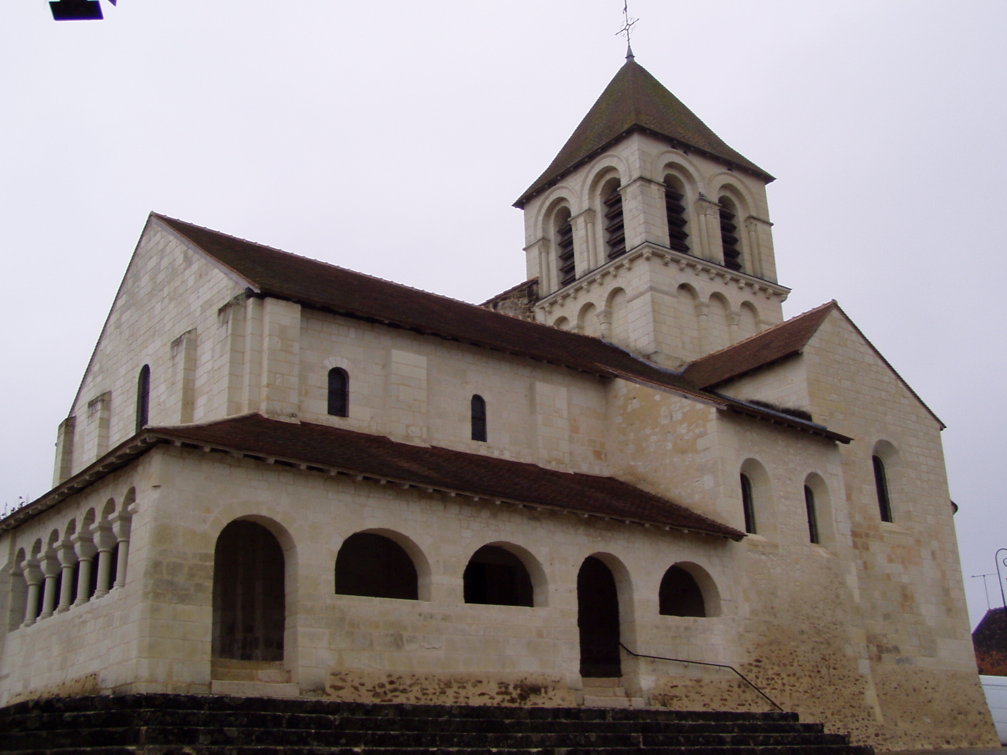 église romane de Oyré dans le département de la Vienne (France)